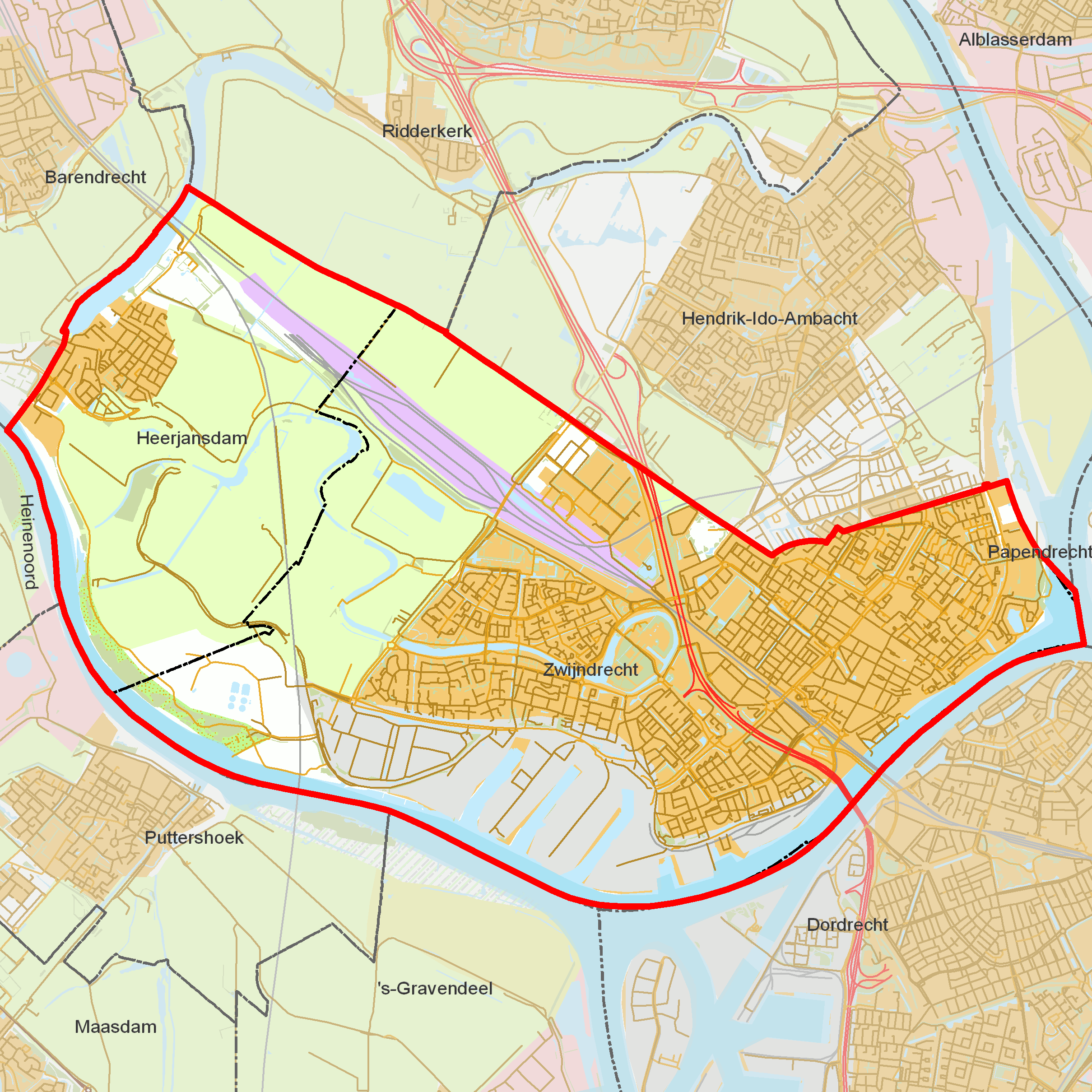 BAG woonplaatsen - Gemeente Zwijndrecht.png